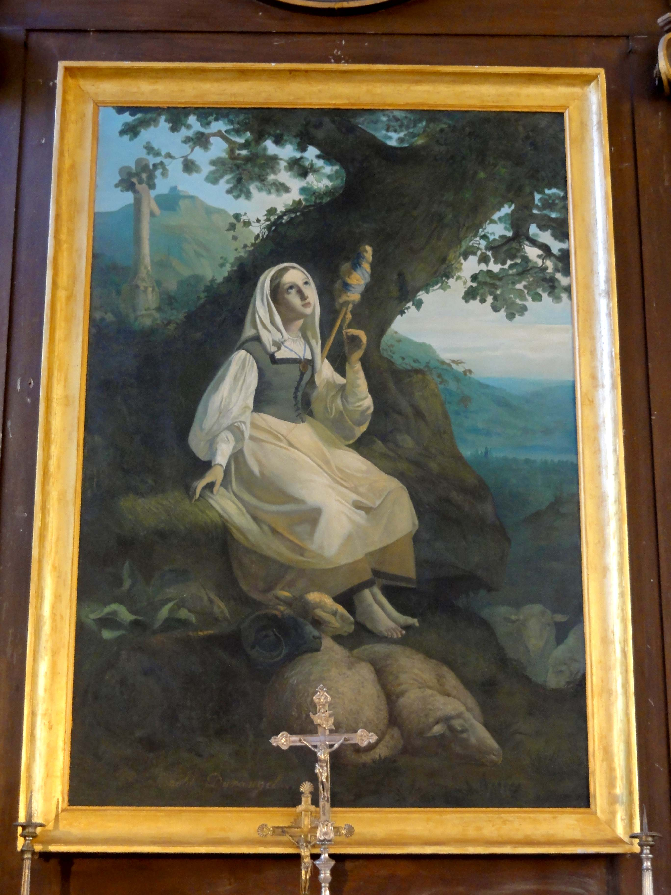 Tableau - sainte Geneviève gardant ses moutons, par Antoine-Victor-Léopold Durand-Durangel (1828 - vers 1898), 1854.